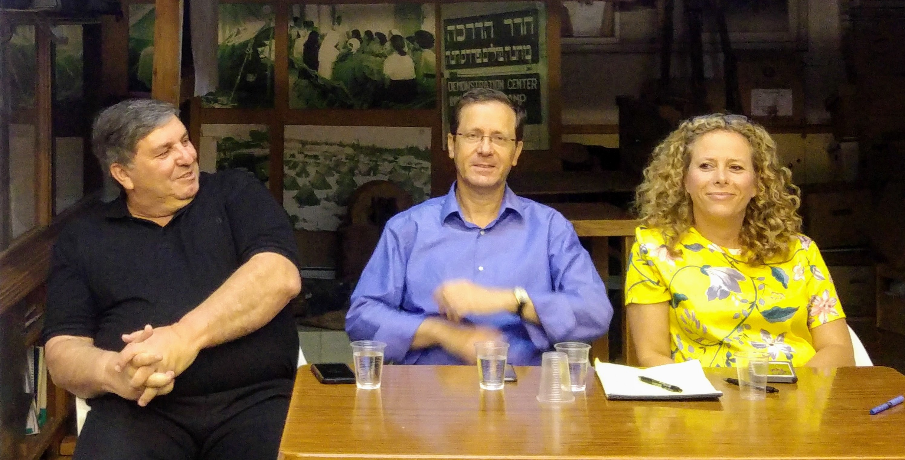 יצחק הרצוג, יושב ראש מפלגת העבודה וחבר כנסת מטעמה, יחד עם דני עטר, יושב ראש קרן קיימת לישראל, ואיילת נחמיאס-ורבין, חברת הכנסת העשרים מטעם הסיעה, במפגש בסניף המקומי בפרדס חנה